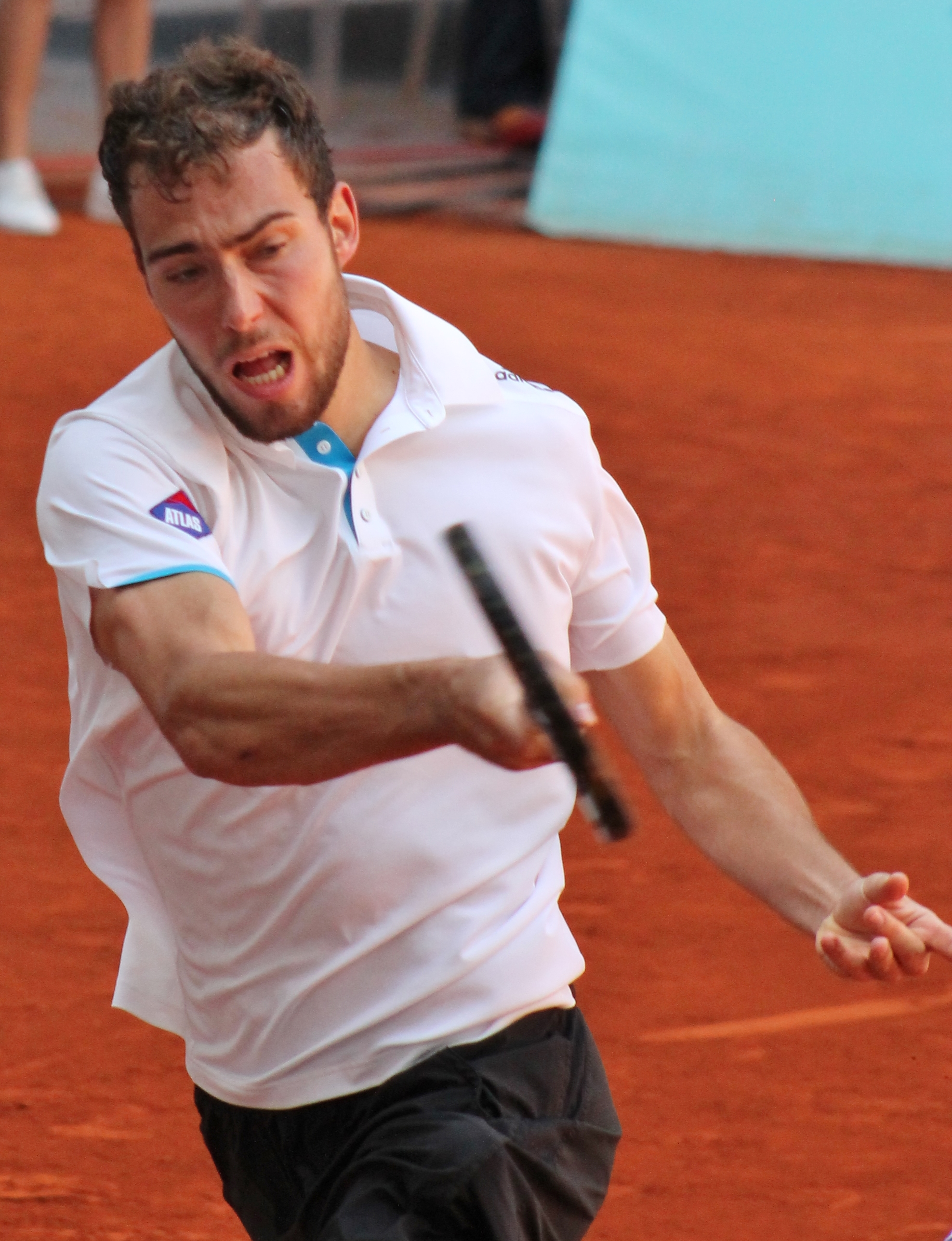 Janowicz MA14 (6)